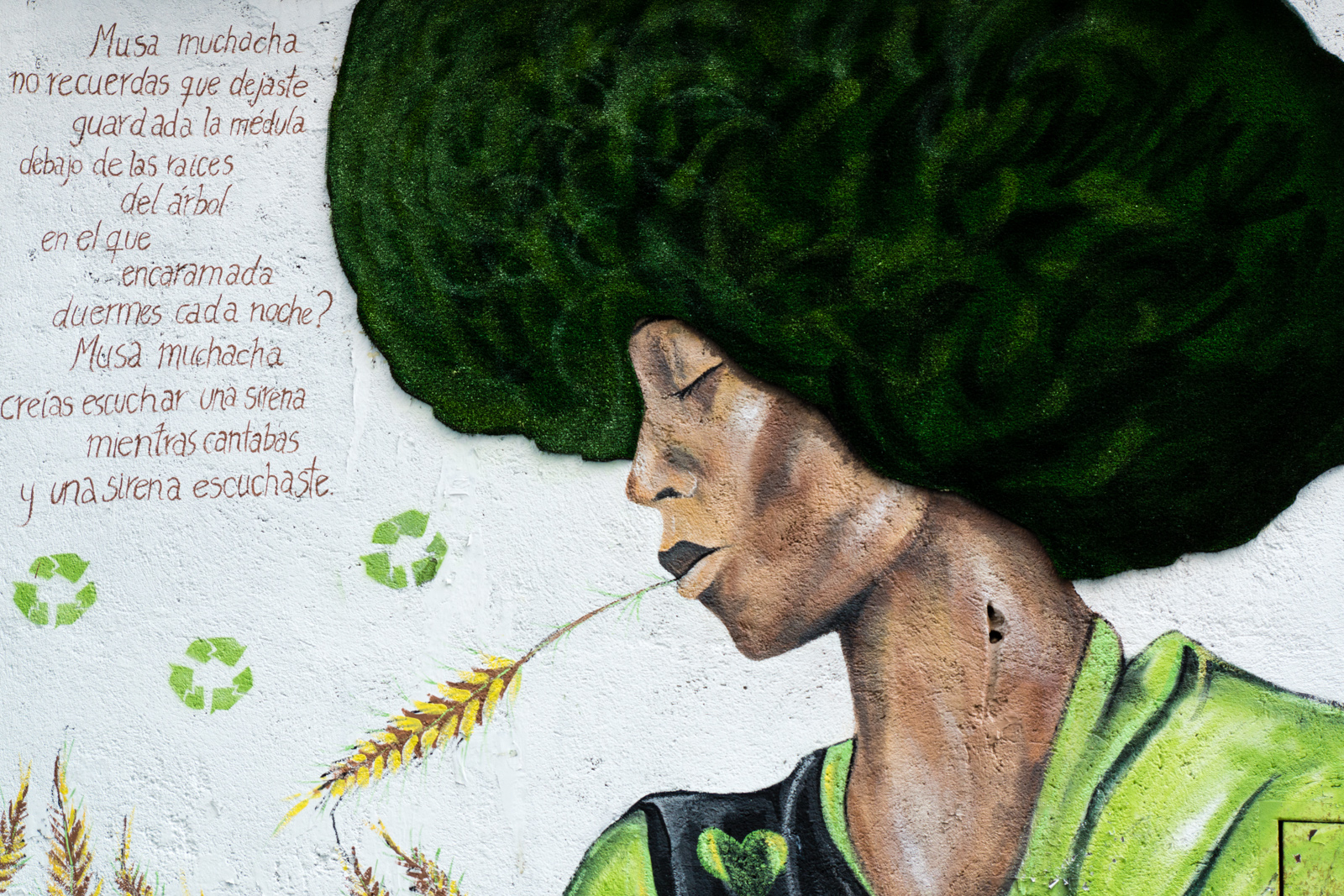 VGO - 20150107 - 7